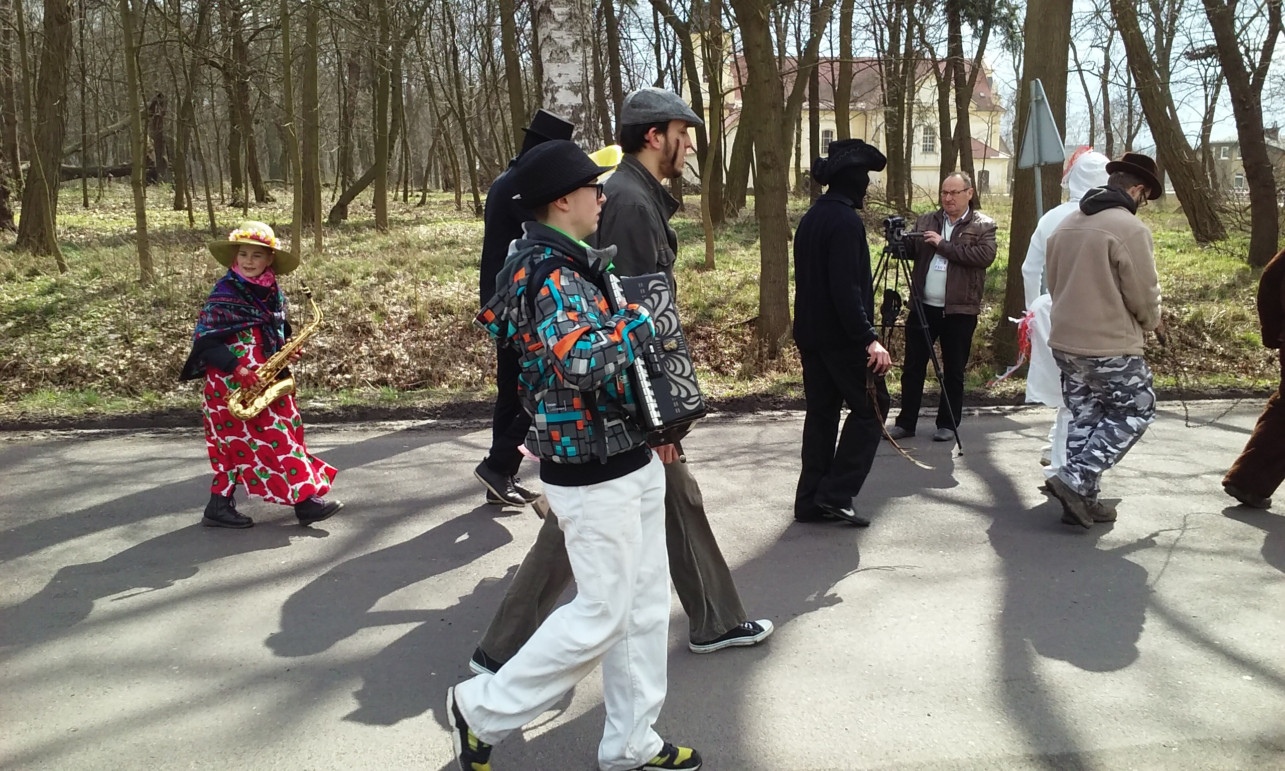 Przebierańcy wędrują po wsi w pierwszy dzień Wielkanocy.